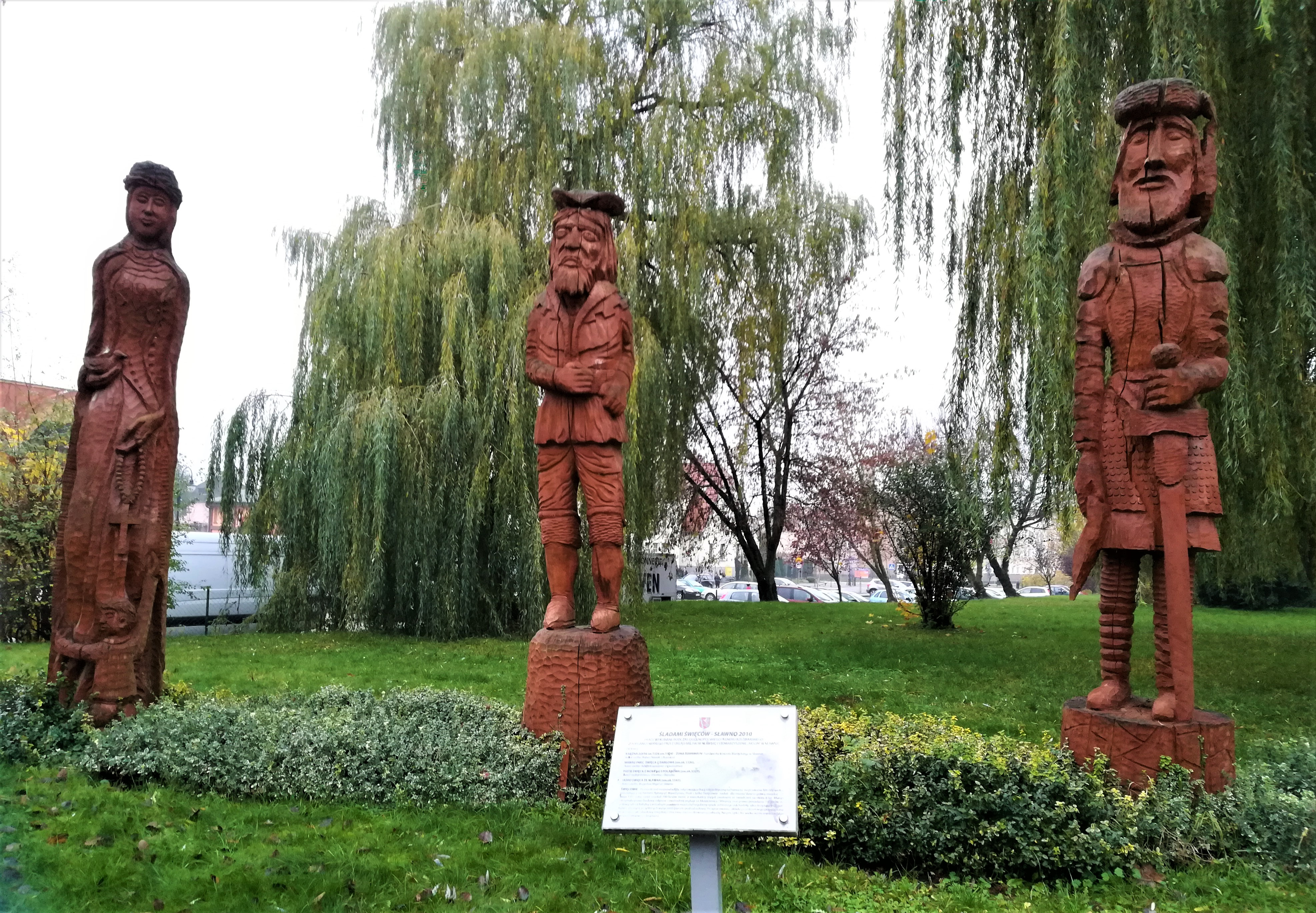 Rzeźby rodu Święców w Sławnie, przy Bramie Koszalińskiej.